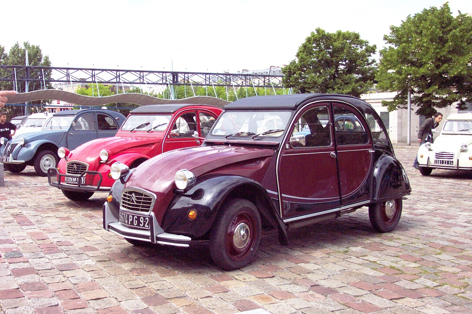 2cv charleston Rouge Delage / Noir